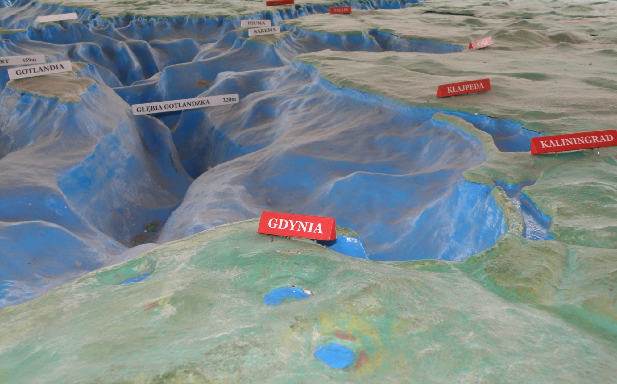 Gdynia, Akwarium Gdyńskie, makieta Morza Bałtyckiego